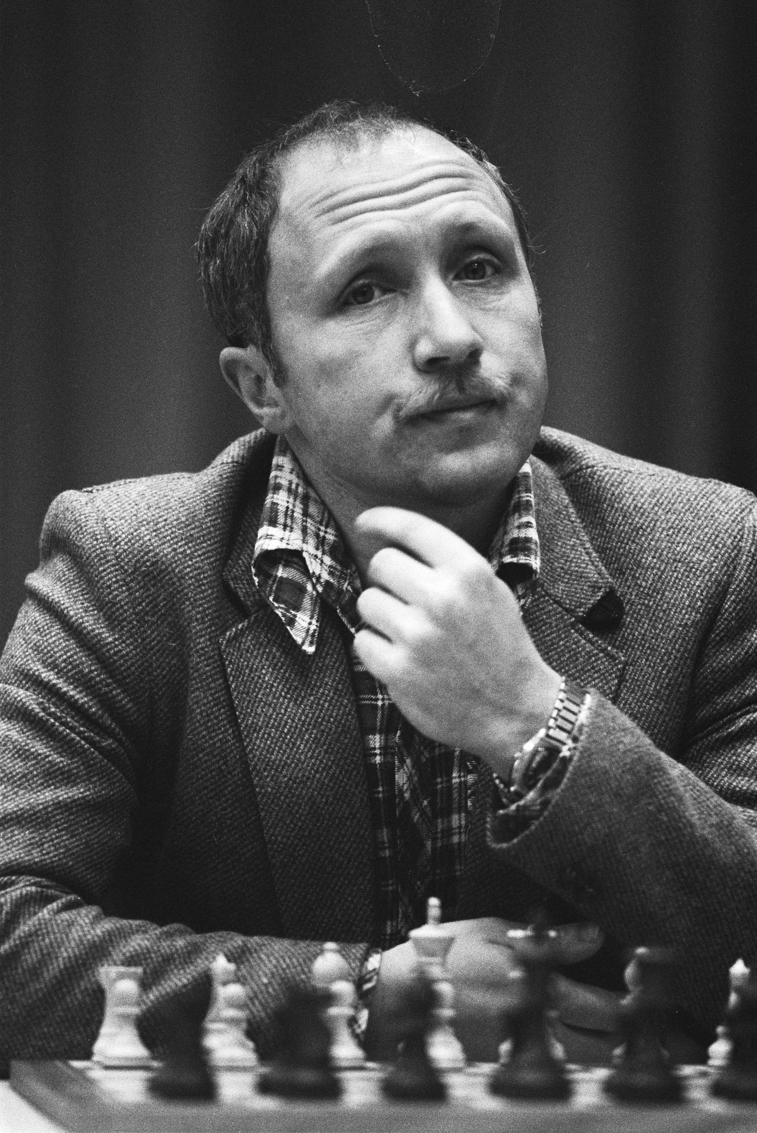 Collectie / Archief : Fotocollectie Anefo Reportage / Serie : [ onbekend ] Beschrijving : Hoogovenschaaktoernooi, 1e ronde; Vladimir Toukmakov Datum : 13 januari 1984 Trefwoorden : schaken Instellingsnaam : Hoogovenschaaktournooi Fotograaf : Bogaerts, Rob / Anefo Auteursrechthebbende : Nationaal Archief Materiaalsoort : Negatief (zwart/wit) Nummer archiefinventaris : bekijk toegang 2.24.01.05 Bestanddeelnummer : 932-8316